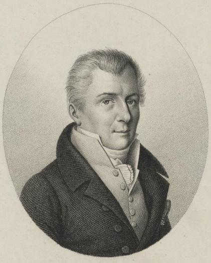 Dalberg, Emmerich von (Freiherr; Herzog; Staatsminister; badischer Politiker; Franz. Diplomat, 1773-1833)